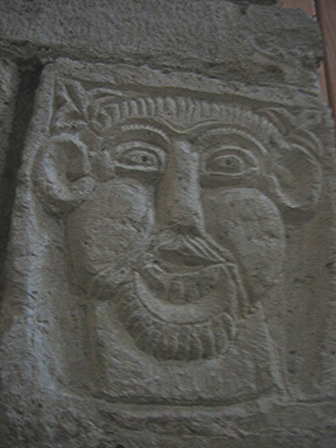 Tournus, Saône-et-Loire, Bourgogne, France. Abbatiale Saint-Philibert. Chapelle Saint-Michel.